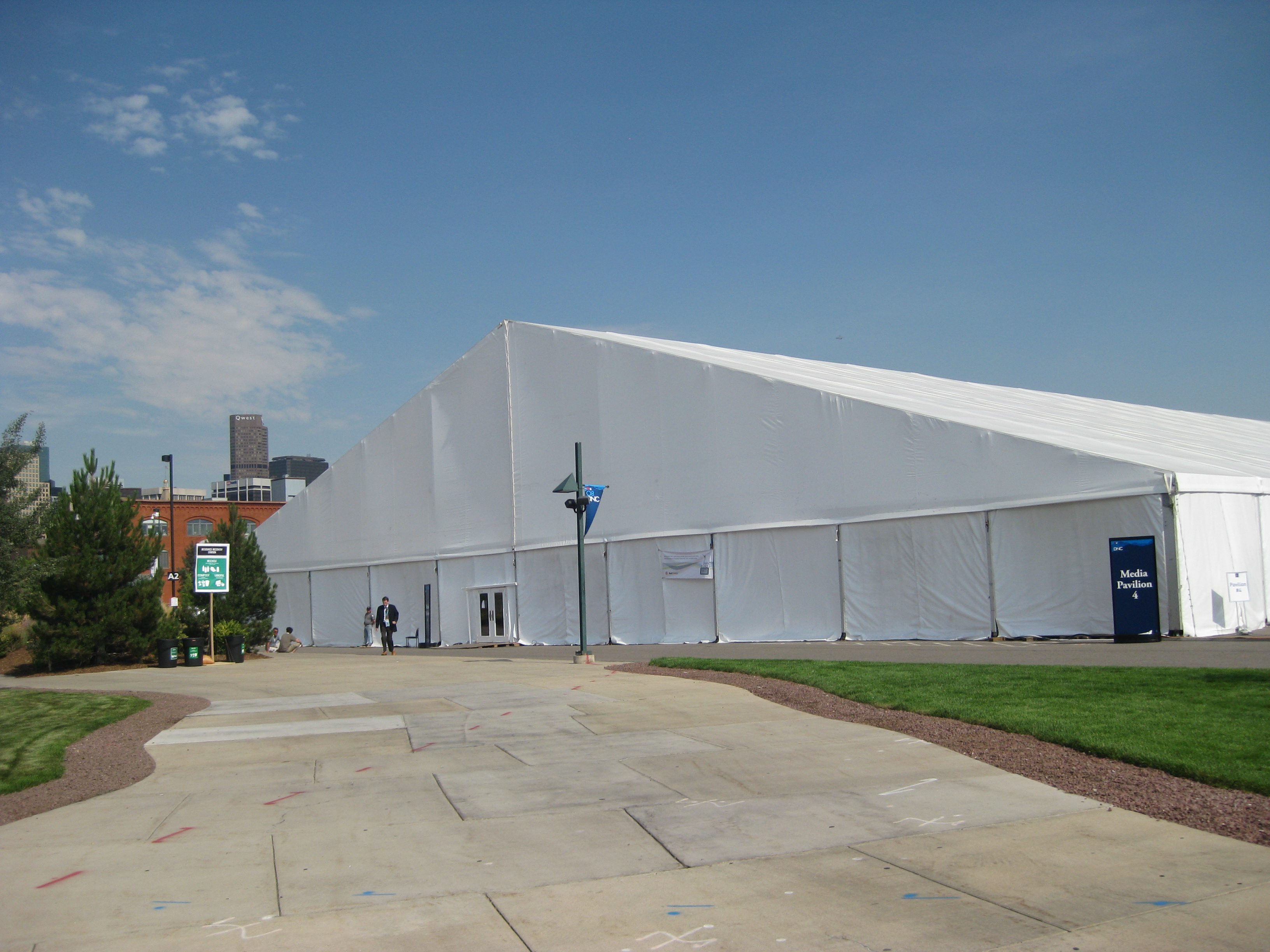 Big media tent, outside view